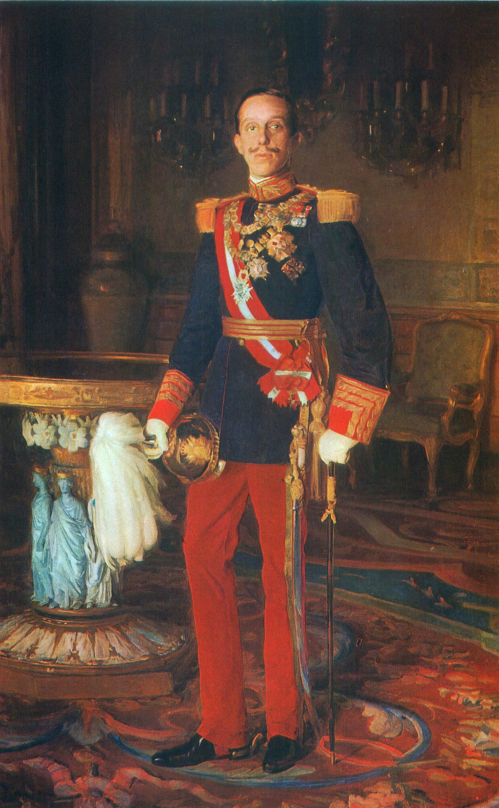 Retrato del rey Alfonso XIII (1886-1941), vestido con uniforme de capitán general y portando el collar de la Orden del Toisón de Oro.